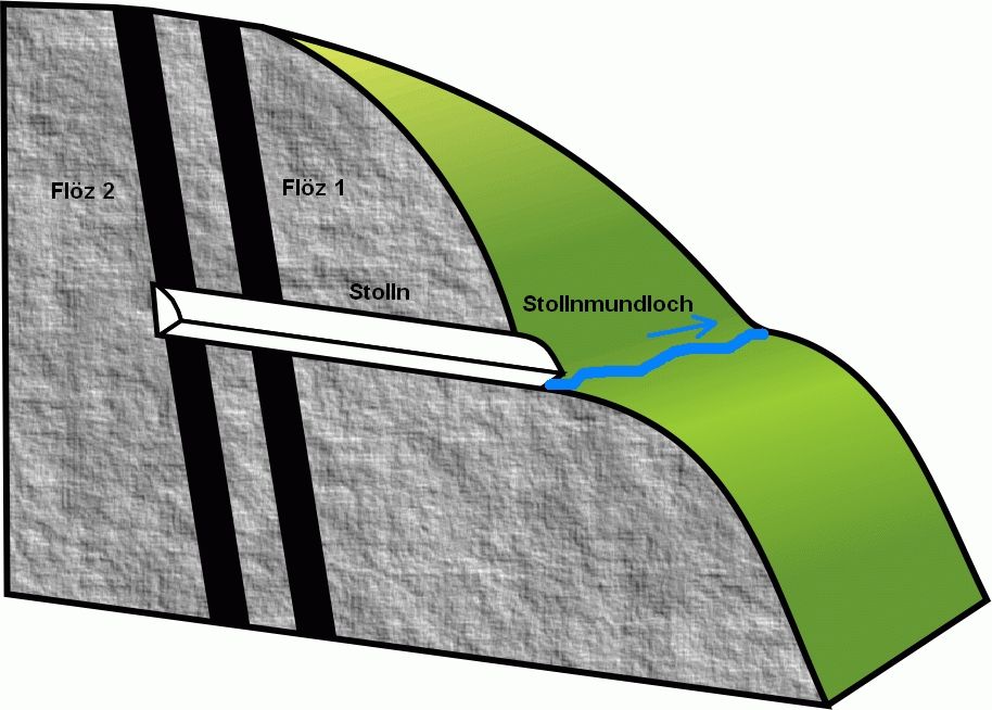 Blockbild eines Stollns.